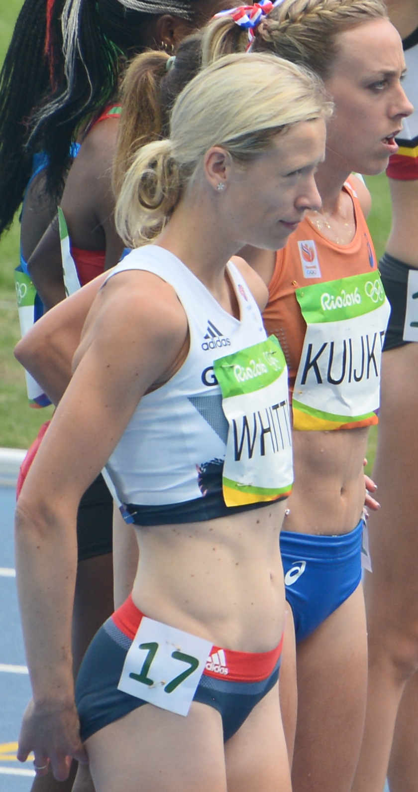 La 1er série du 5000m féminin à Rio 2016